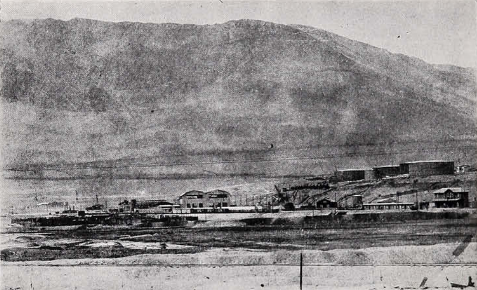 Vista general de la estación El Colorado del Ferrocarril de Iquique a Pintados